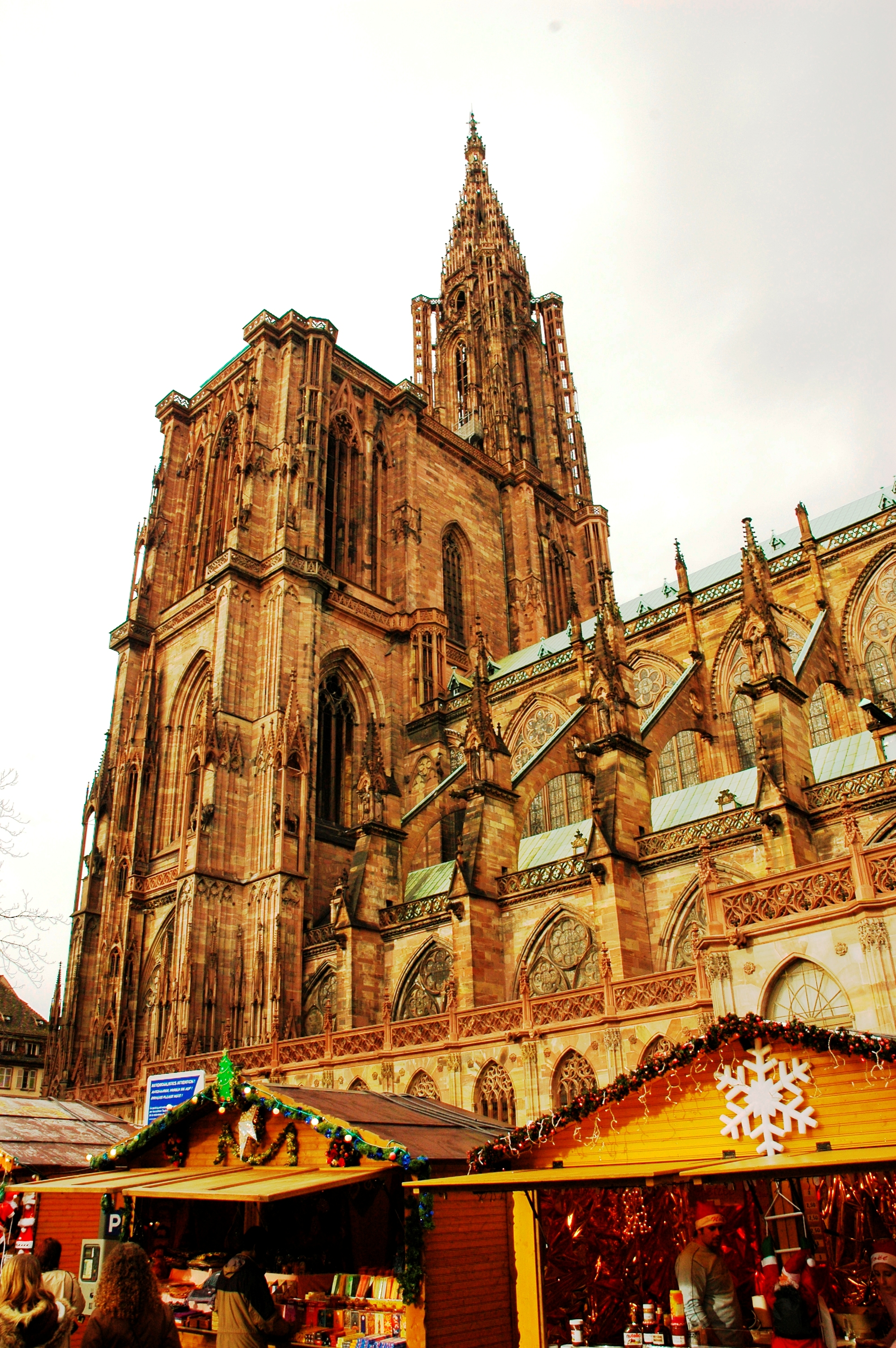 Haute de 142 mètres, de style gothique, construite en grès rose des Vosges, la cathédrale de Strasbourg fut jusqu'en 1874, le monument le plus haut du monde.Remarquable pour sa flèche unique, elle s'inscrit parfaitement dans un environnement particulièrement bien préservé.